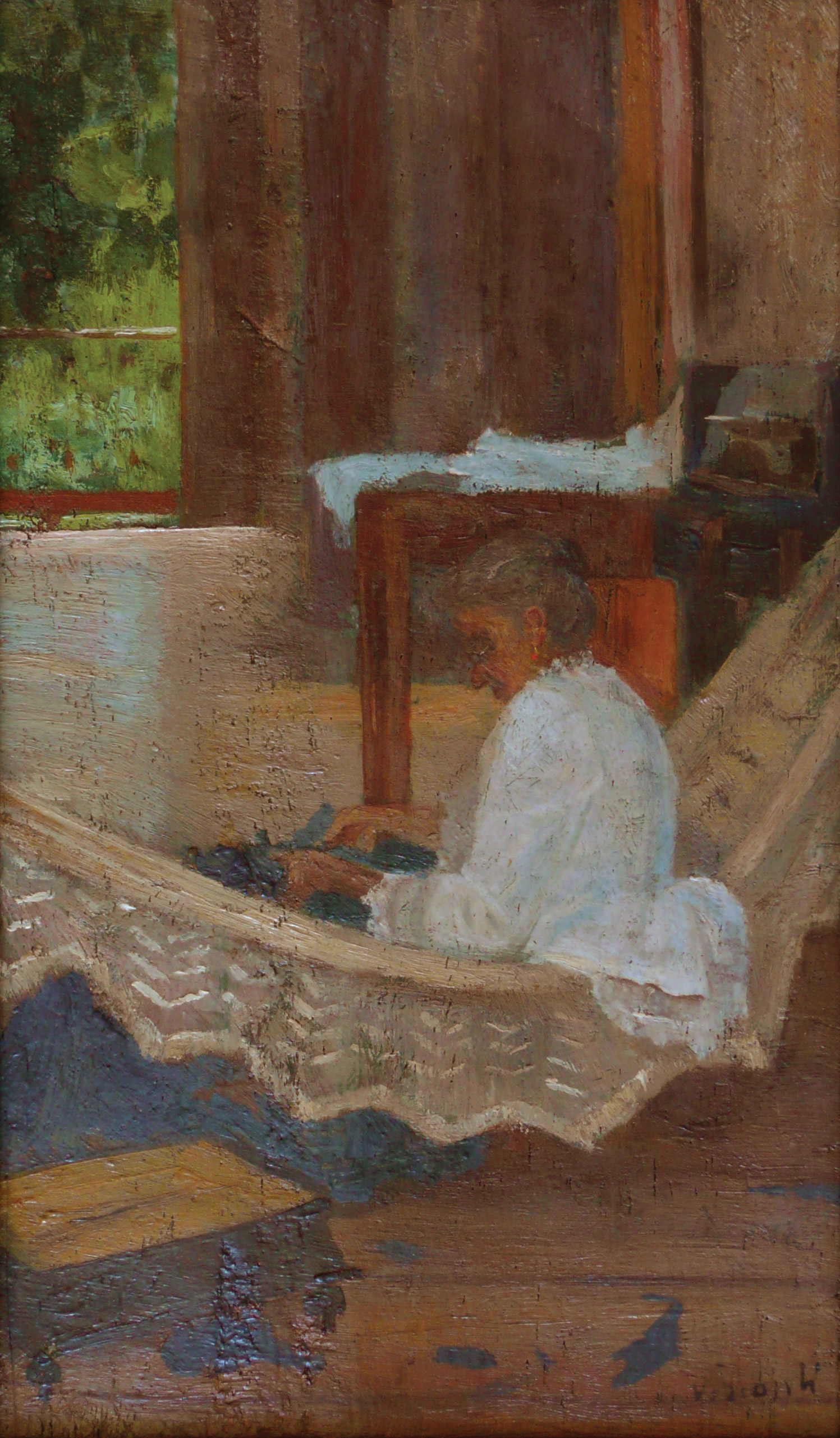 Obra do Projeto Eliseu Visconti